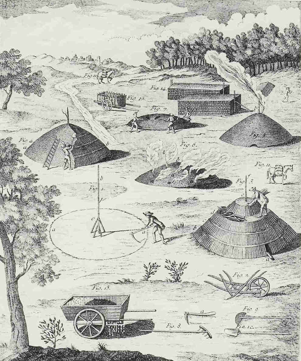 Carbonaie Incisione di testo del XVIII secolo